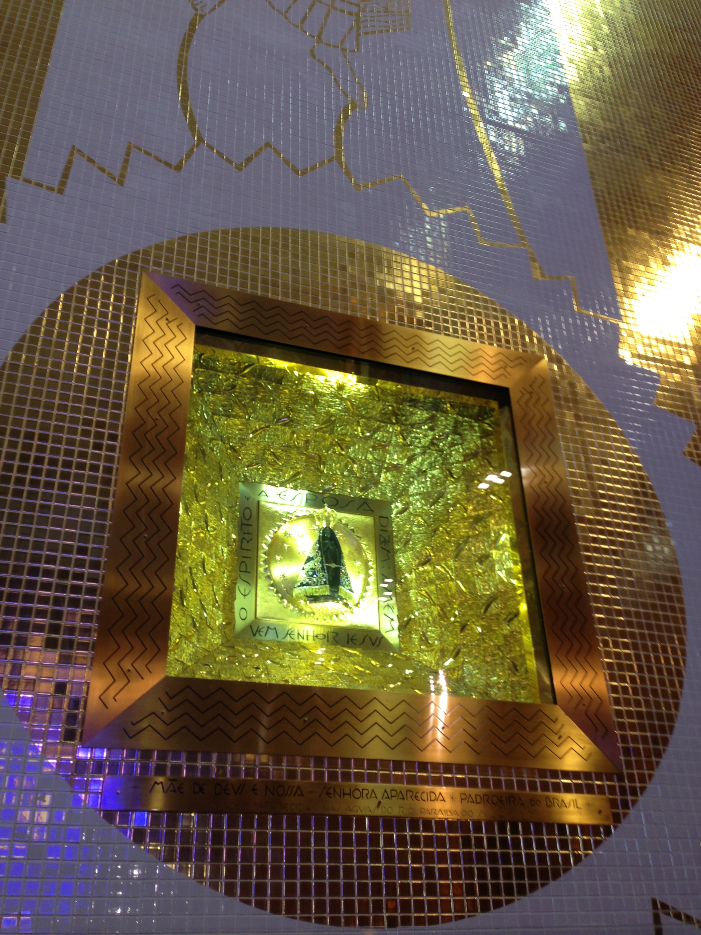 Basílica de Nossa Senhora de Aparecida